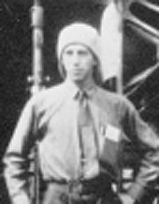 General Gustavo Salinas Caamiña